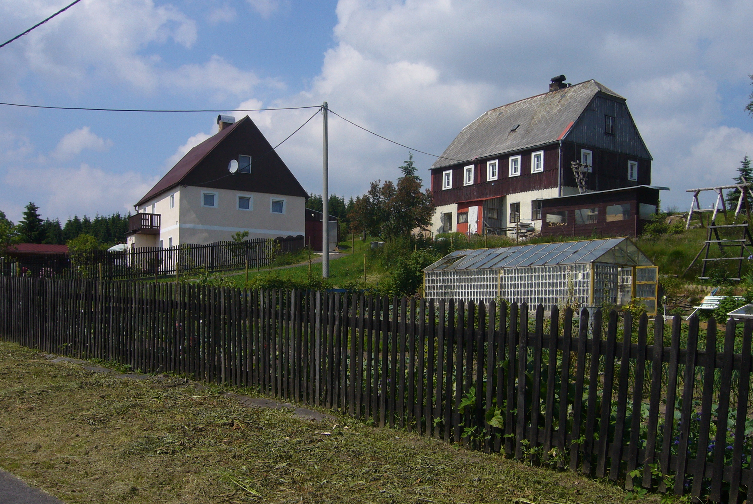 Domy na severozápadním okraji vesnice